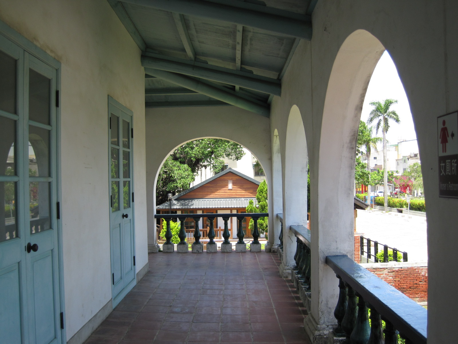 臺南市安平德記洋行二樓拱廊